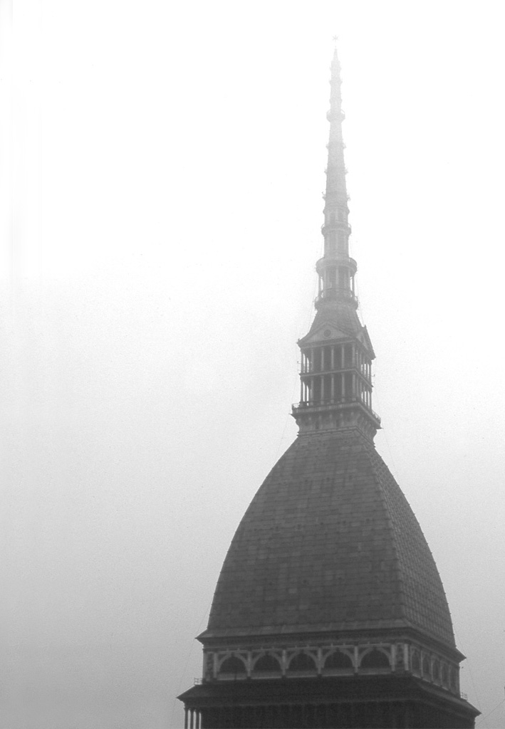 Mole Antoneliana, Torino, Italia